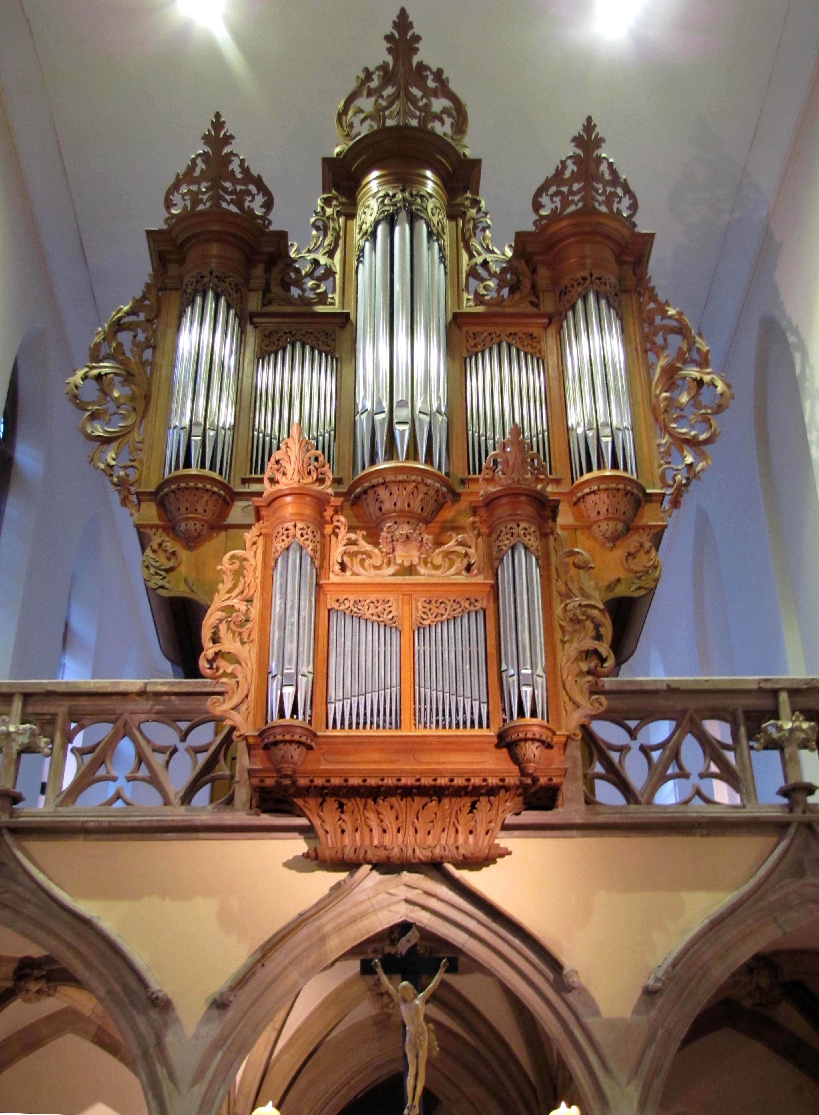 Alsace, Bas-Rhin, Église protestante Saint-Guillaume de Strasbourg (PA00085026).Jubé avec l'orgue André Silbermann (1728): This object is classé Monument Historique in the base Palissy, database of the French furniture patrimony of the French ministry of culture, under the references orgue PM67000973 orgue and buffet PM67000404 buffet.